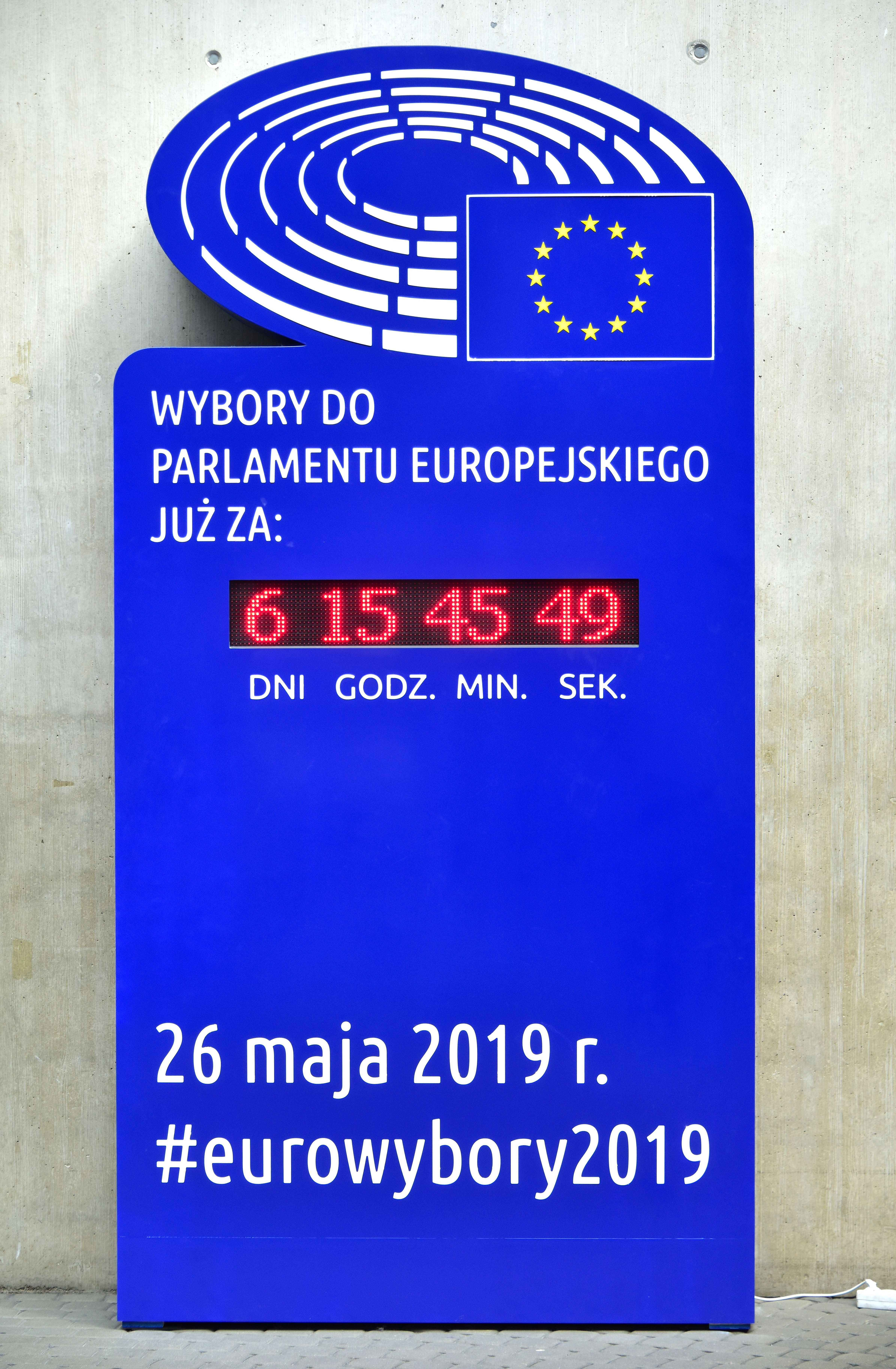 Elektroniczny licznik pokazujący czas do rozpoczęcia głosowania w wyborach do Parlamentu Europejskiego w holu głównym Biblioteki Uniwersyteckiej w Warszawie